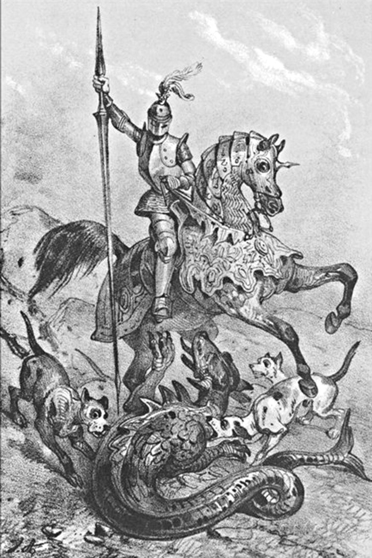 Le chevalier Dieudonne De Gozon combattant le dragon de Rhodes. Dessin de Victor Adam (1801-1886)